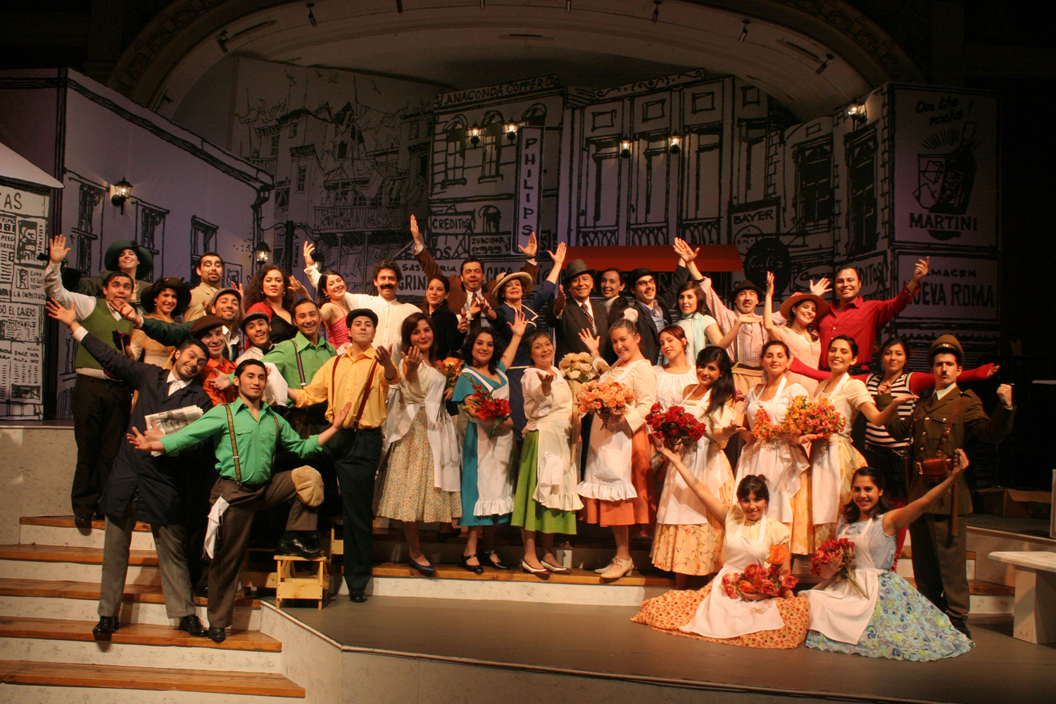 Montaje realizado el el colegio Ex-alemán de Valparaíso